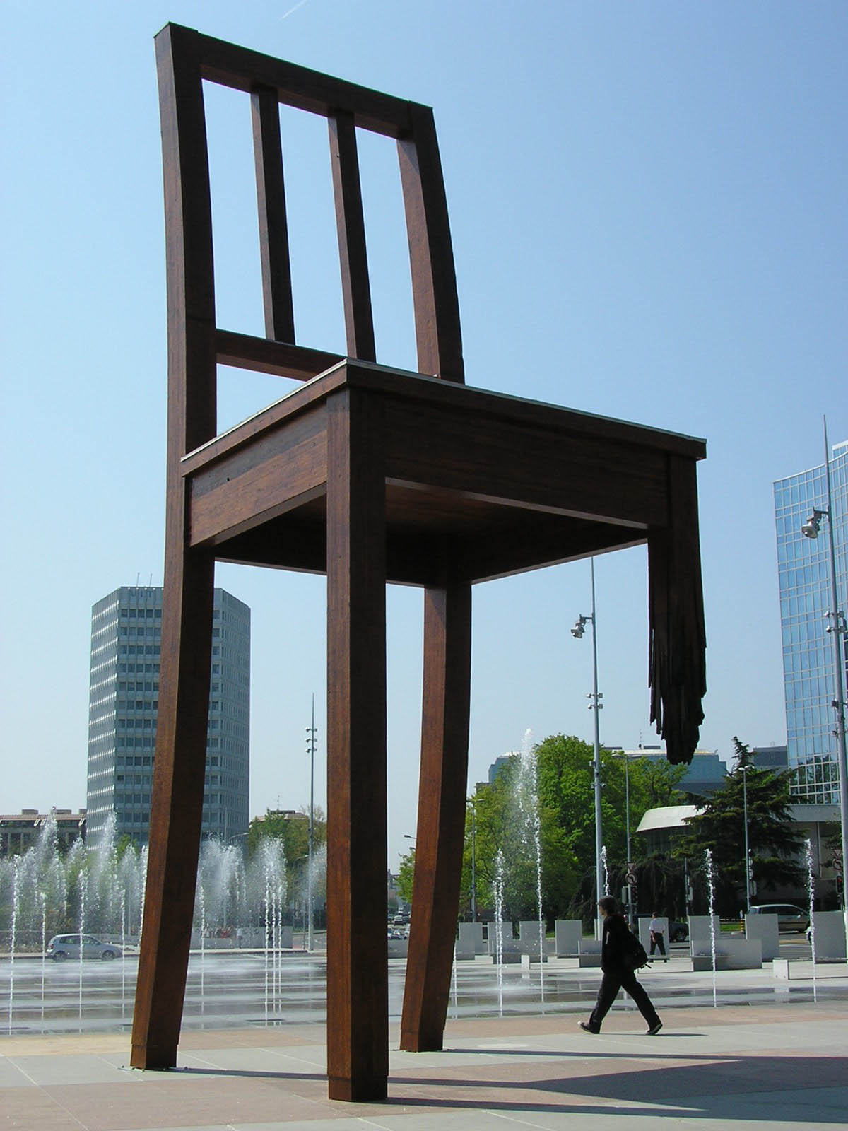 Sculpture Broken Chair sur la Place des Nations à Genève